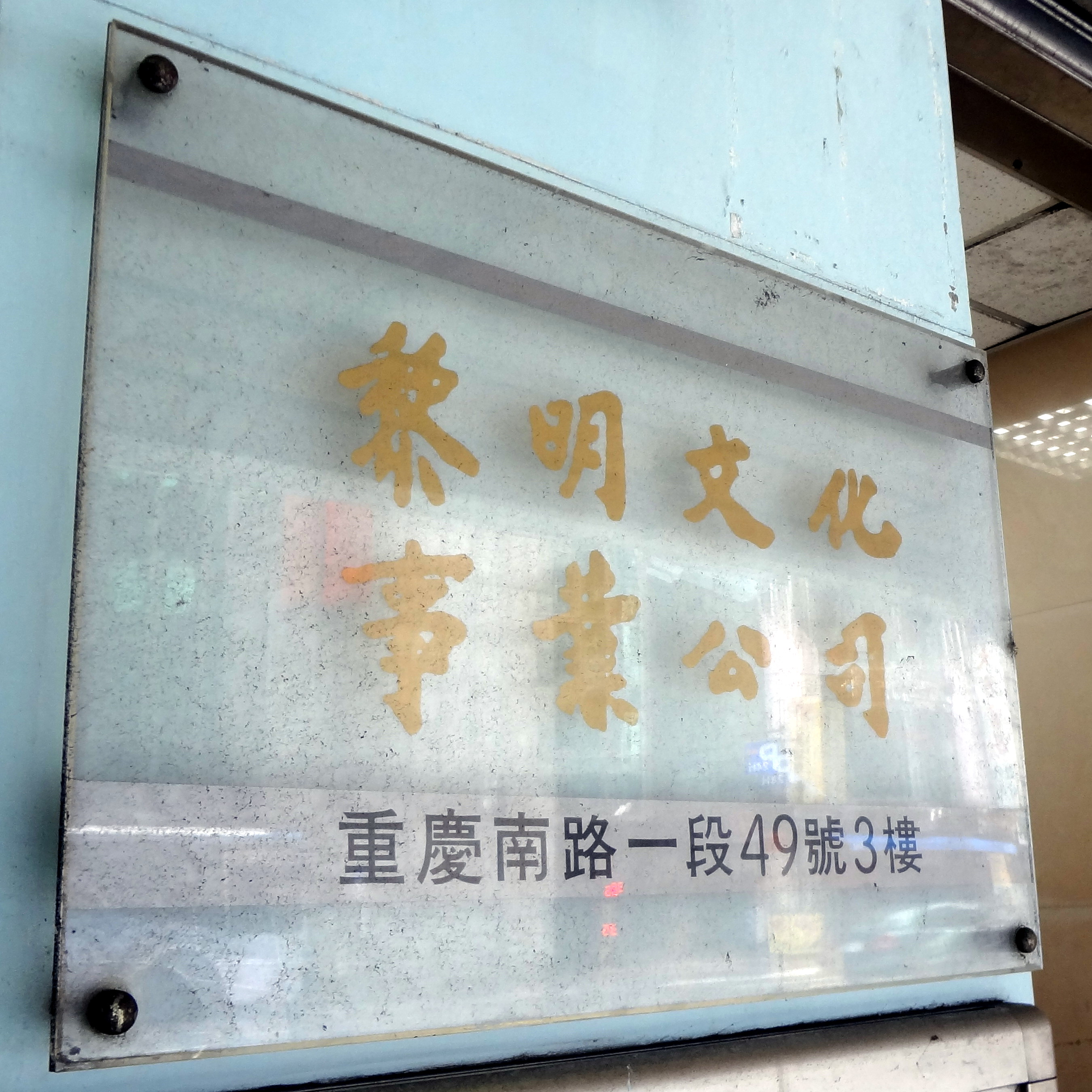 黎明文化總部，位於臺北市中正區重慶南路一段49號3樓。此為同棟1樓釘掛的黎明文化總部銘板。